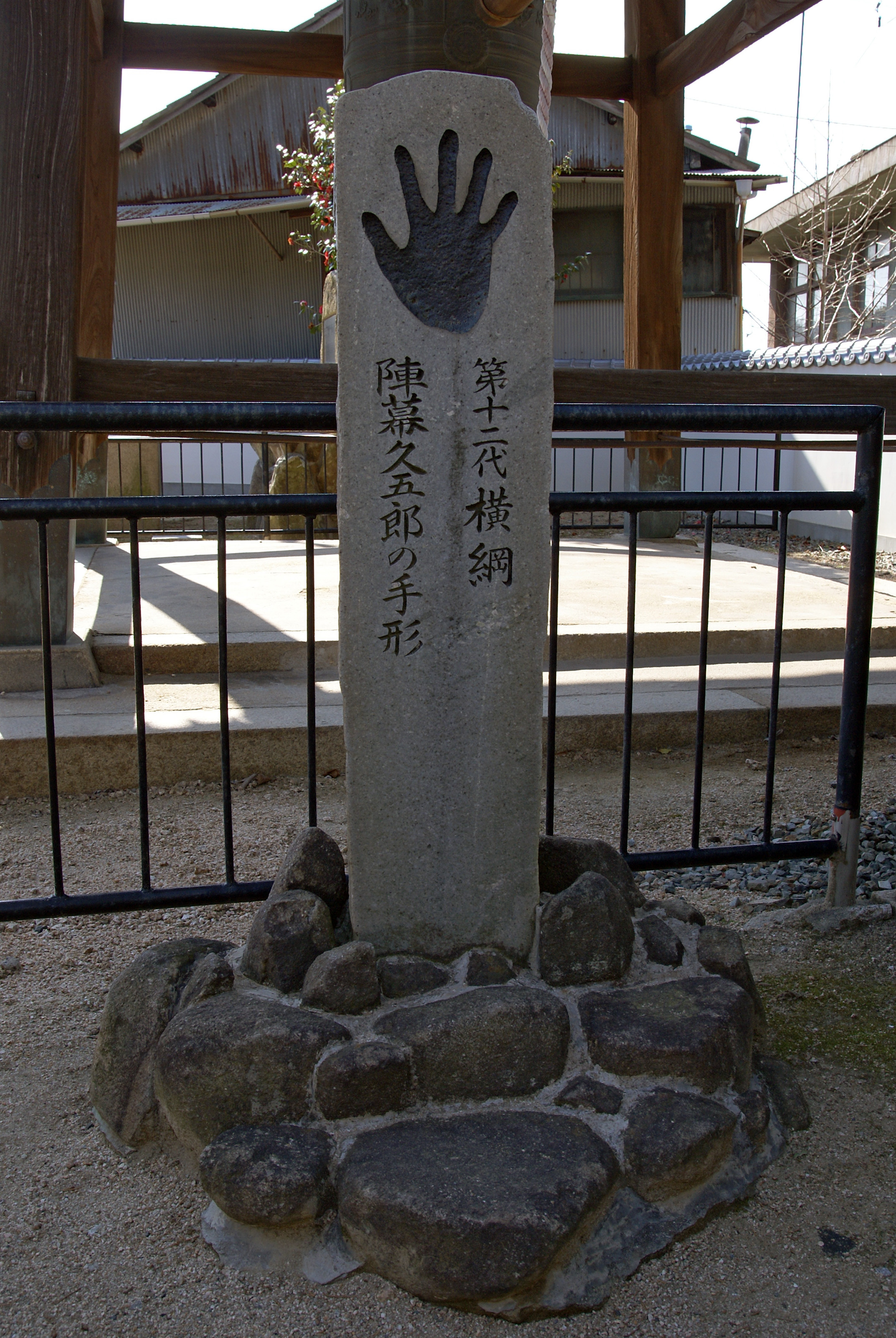 Komyoji in Onomichi, Hiroshima prefecture, Japan